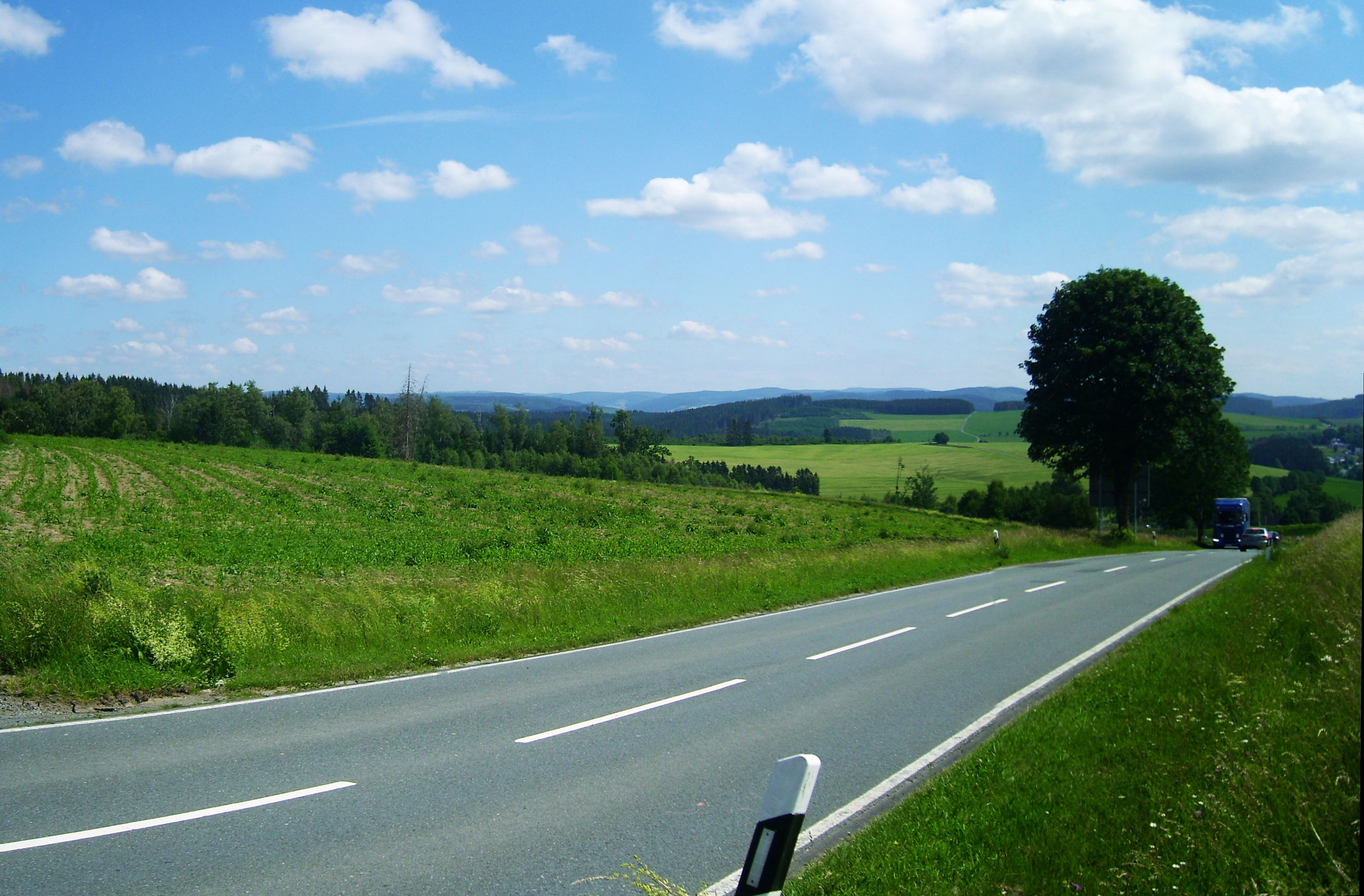 Hügellandschaft der Wittgensteiner Kammer im Inneren des Rothaargebirges im Bereich der erhemaligen Gemeinde Balde (von Leimstruth-Bahnhof aus), rechts im Hintergrund Rinthe (Bad Berleburg). Im Hintergrund sind markante Berge des Rothaargebirges erkennbar (von rechts nach links): Mittelkopf (601.6 m; 4,7 km) östlich von Hemschlar und links der Alleebäume: Nesselbergskopf (673,4 m; 11,11 km) und Langer Wald (666,4 m; 9,9 km) östlich Bad Berleburgs, Wilde Struth Wallershöhe (812,1 m: 20,1 km) und Ziegenhelle (816,1 m; 20,1 km) Homburg (721,8 m; 15,1 km), südwestliches Massiv der Ziegenhelle Siebenahorn (gut 740 m; 19,9 km) und Zwistberg (747,0 m; 20,1 km), Letzterer mit seinem Vorgipfel Baukopf (729,4 m; 19,2 km) verschmolzen, nordwestliches Ziegenhelle-Massiv südöstliche Asten-Vorhöhen und Kahler Asten (841,9 m; 23,4 km) – siehe Udeuschle